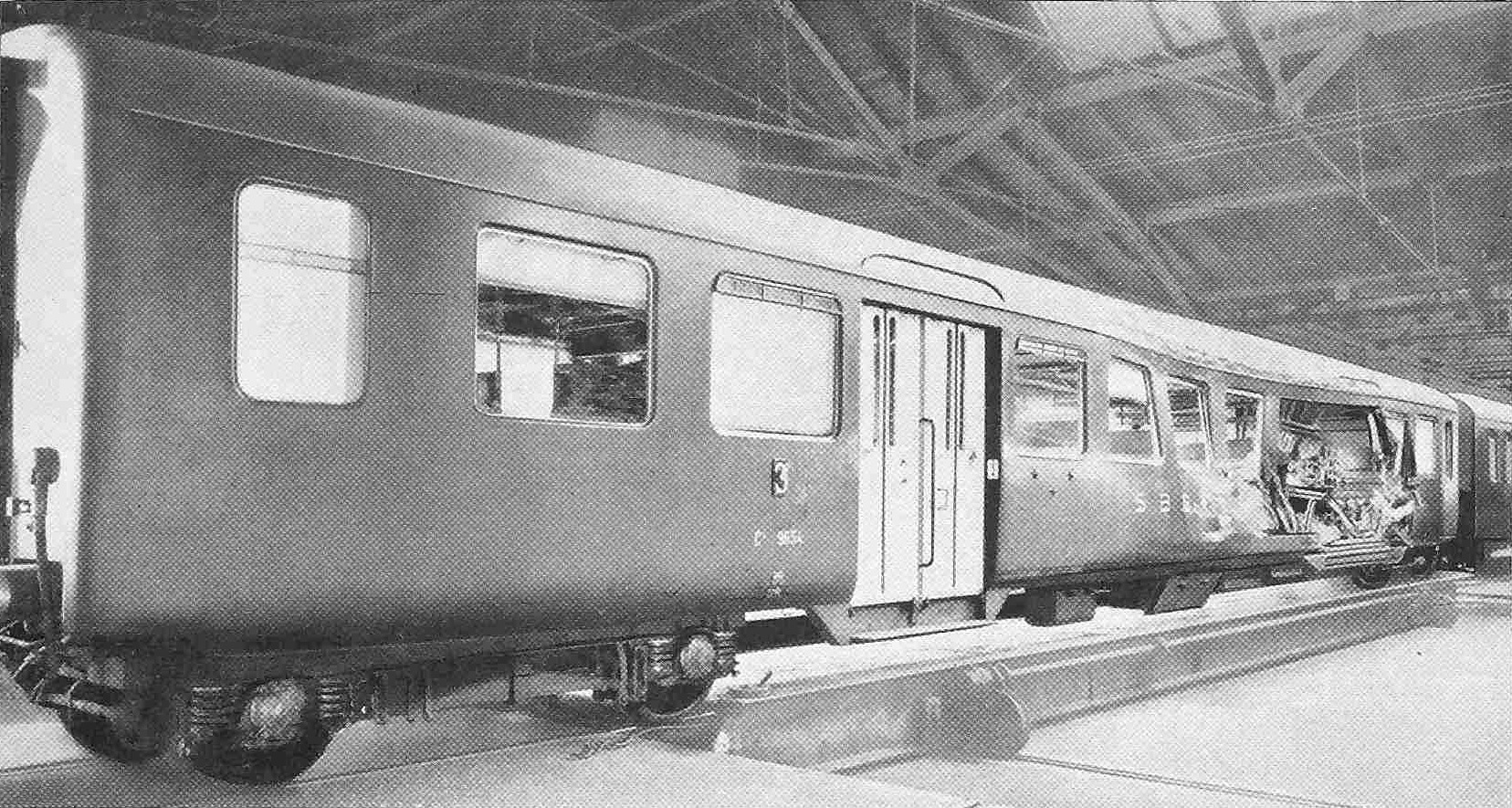 Der in die linke Seitenwand getroffene zweitletzte Leichtstahlwagen C4ü